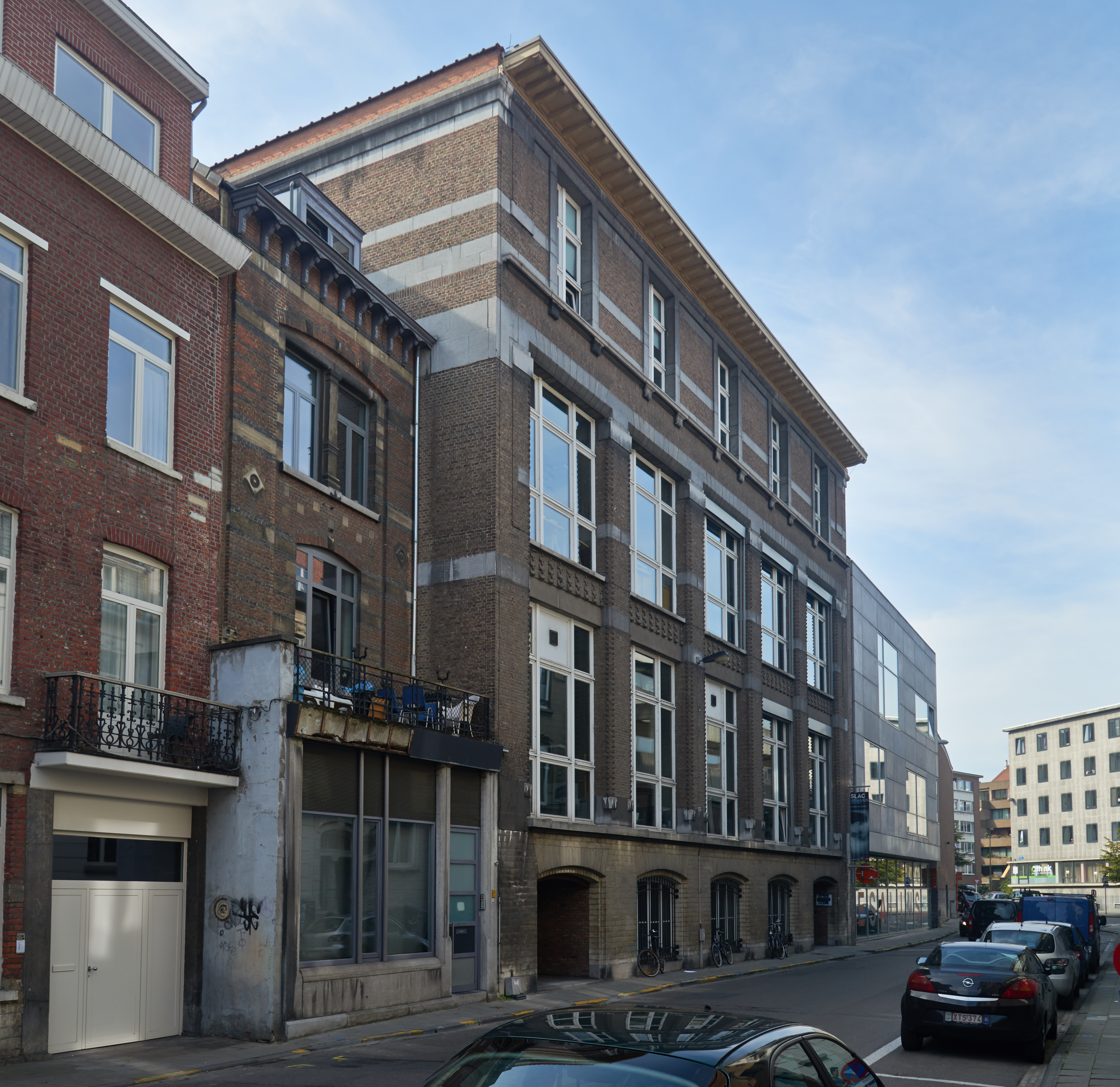 Leuven, Craenendonck 21